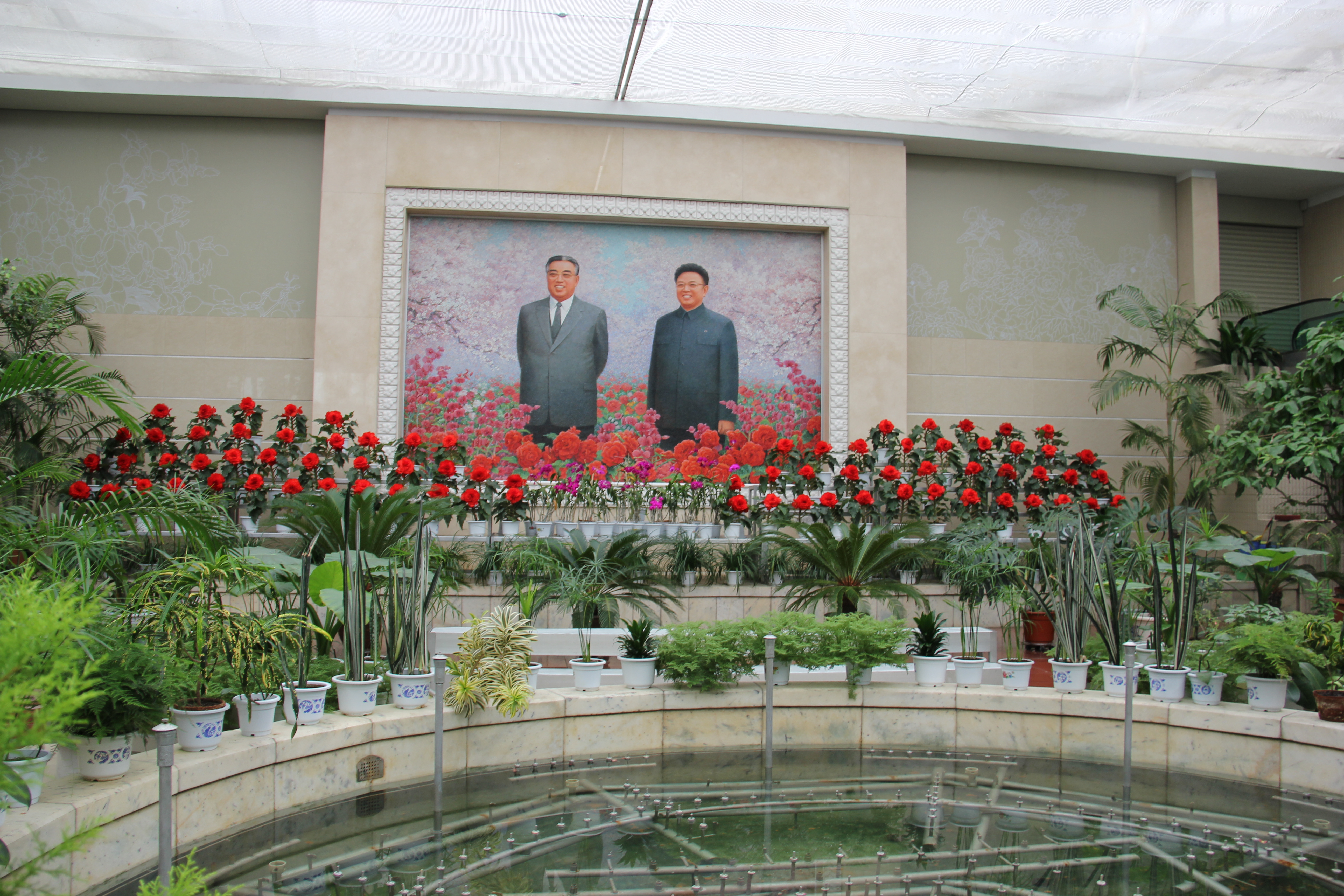 Kimilsungia-Kimjongilia Exhibition House